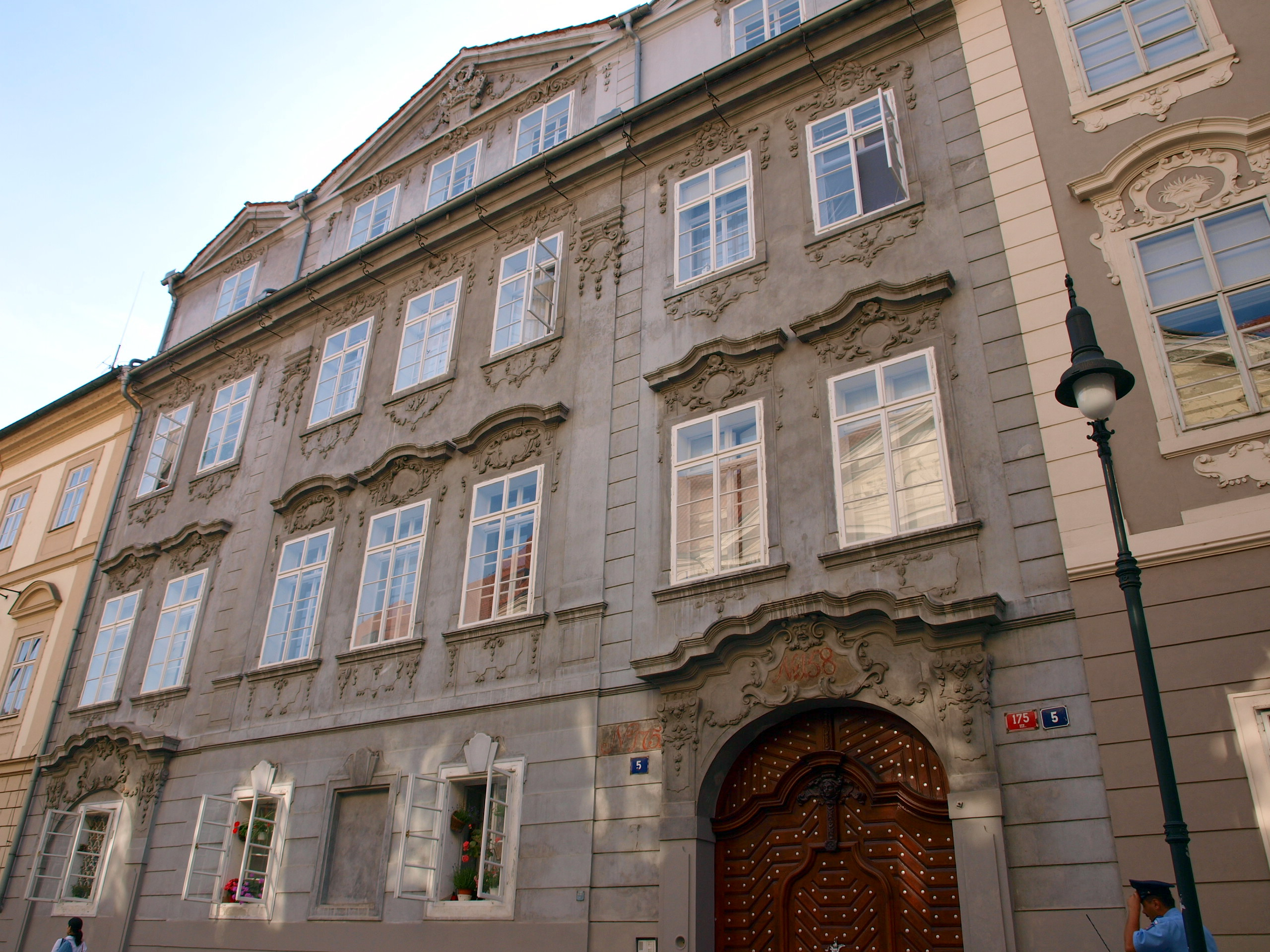 Palác Lažanských (Malá Strana)